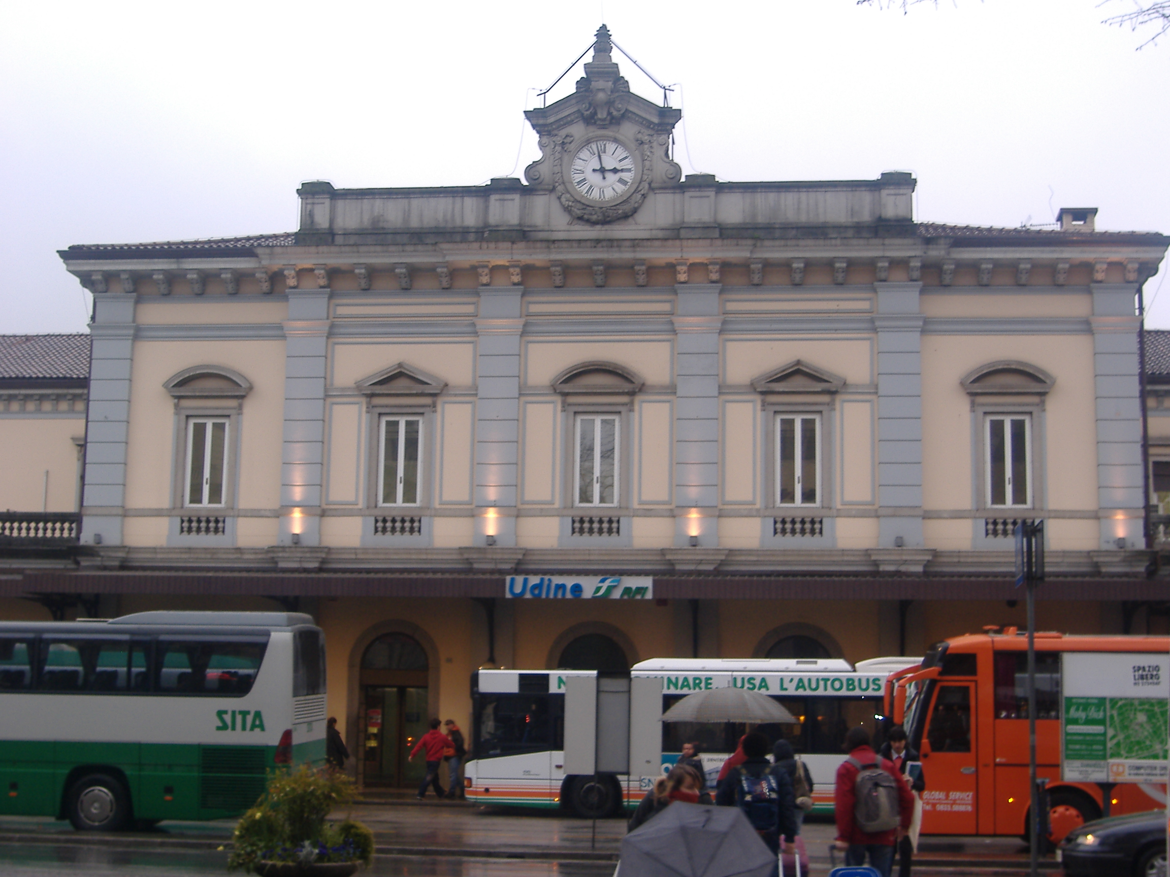 Il fabbricato viaggiatori della stazione di Udine